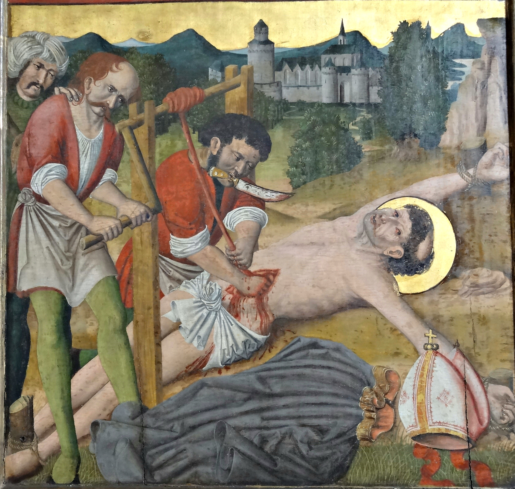 crop: File:St. Gottfried (Butzbach) Marienaltar 11.JPG by me